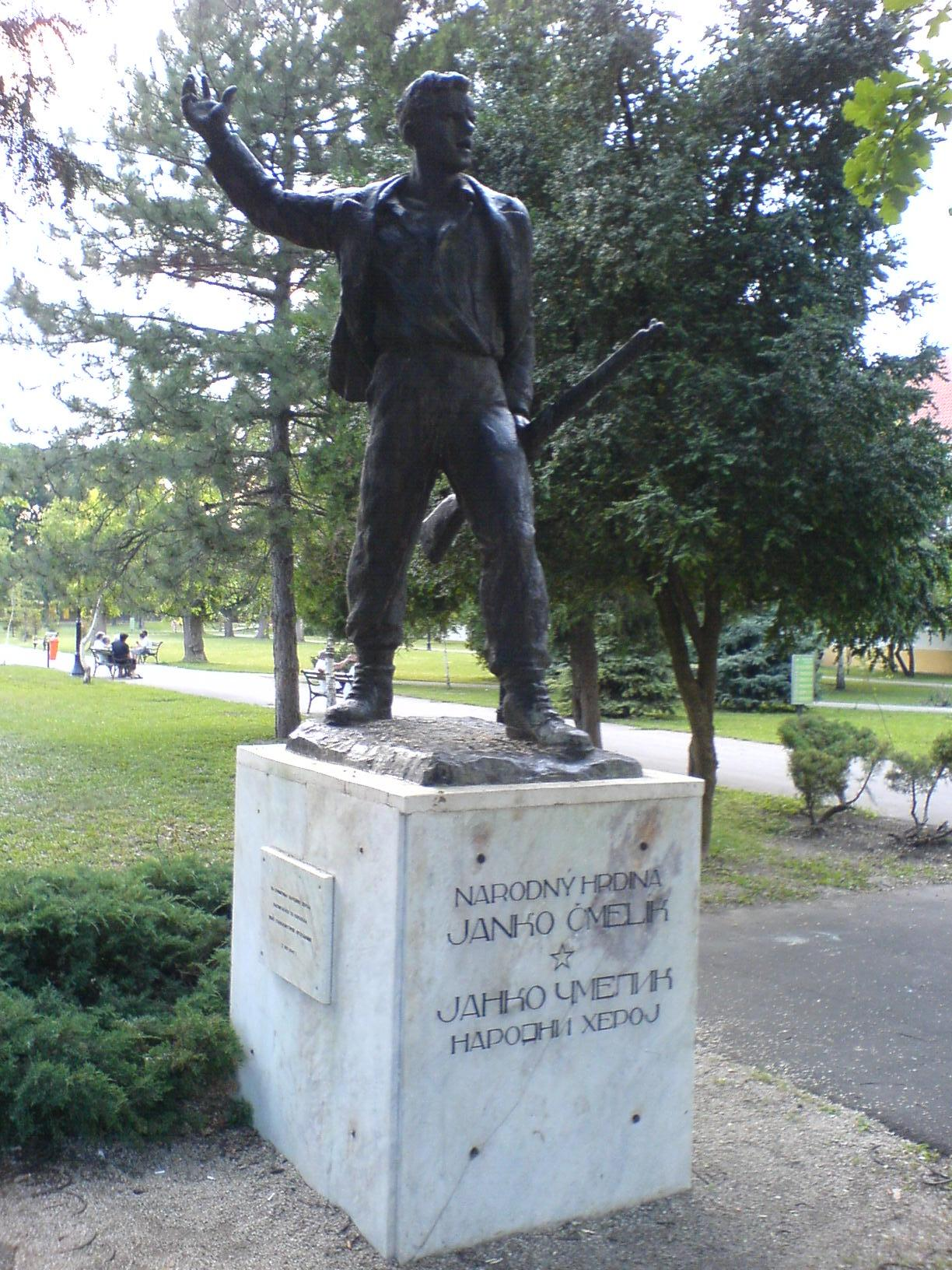 Spomenik Janku Čmeliku u Staroj Pazovi.